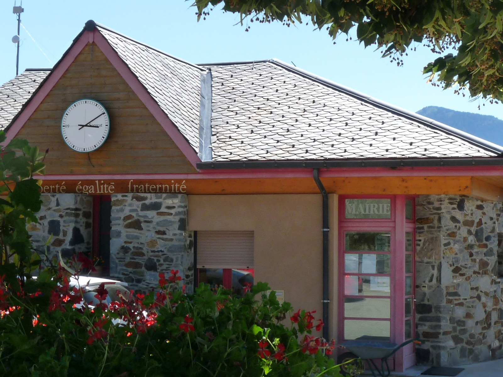 Mairie de Sorgeat, Ariège, France